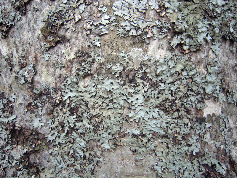 Lišaj sa Biogradske gore